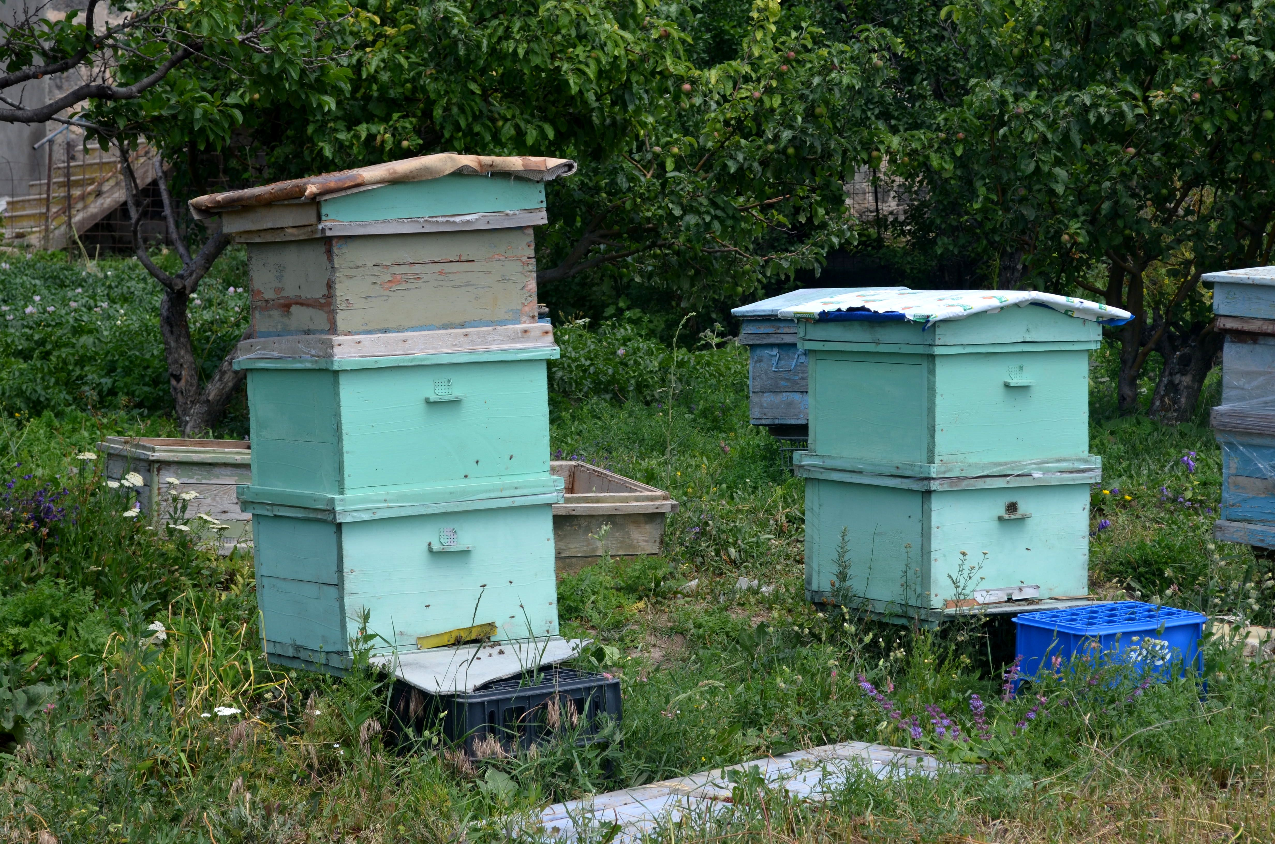 Մեղվապահությունը Ծաղկունքում